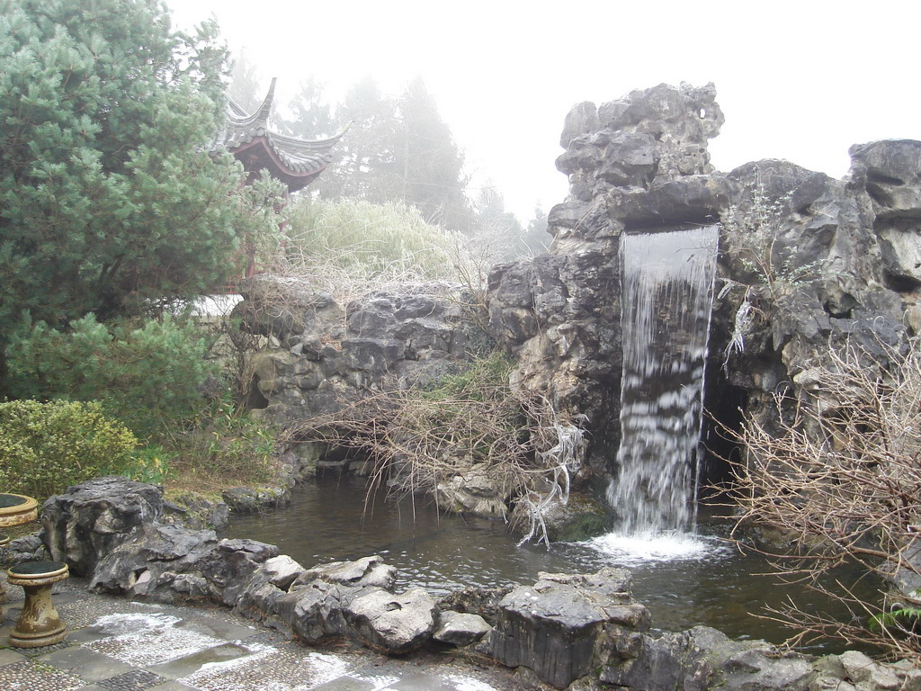 Chinese tuin in Haren